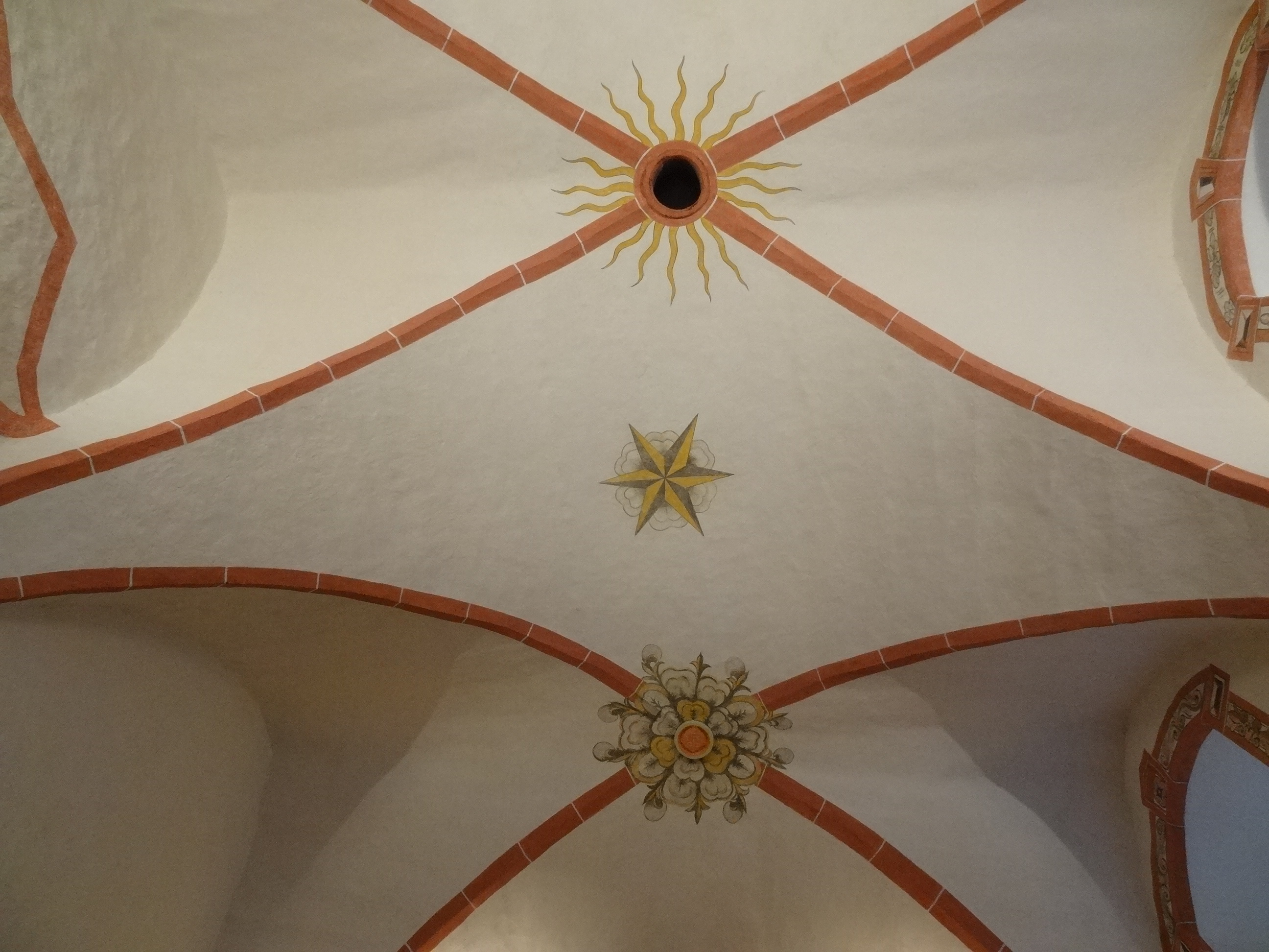 St. Michaelis Oberkleen